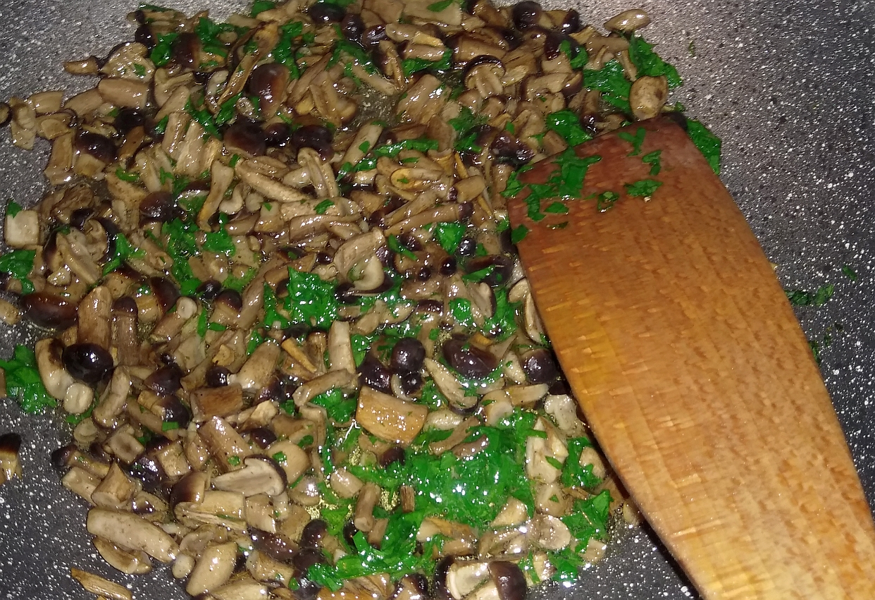 Pioppini (Cyclocybe aegerita) in cottura con prezzemolo